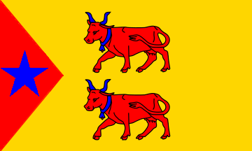 bandèra deu principat de Lars